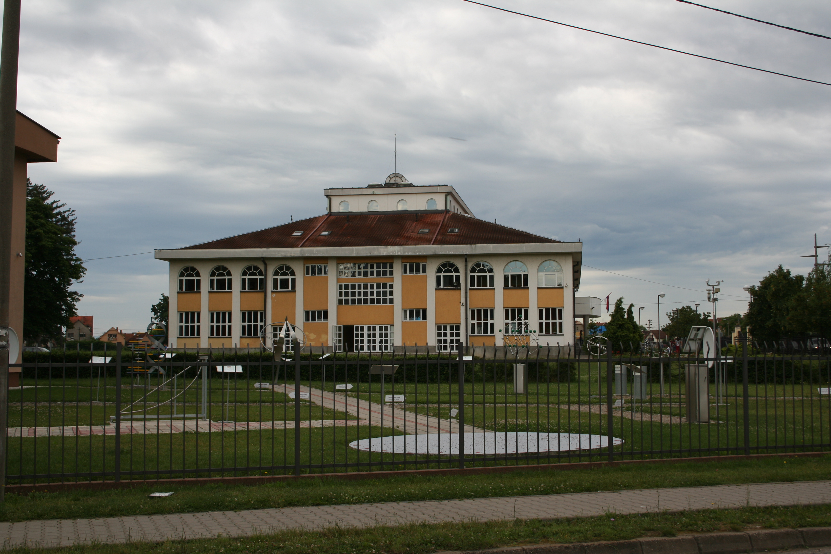 Škola na Letnjikovcu